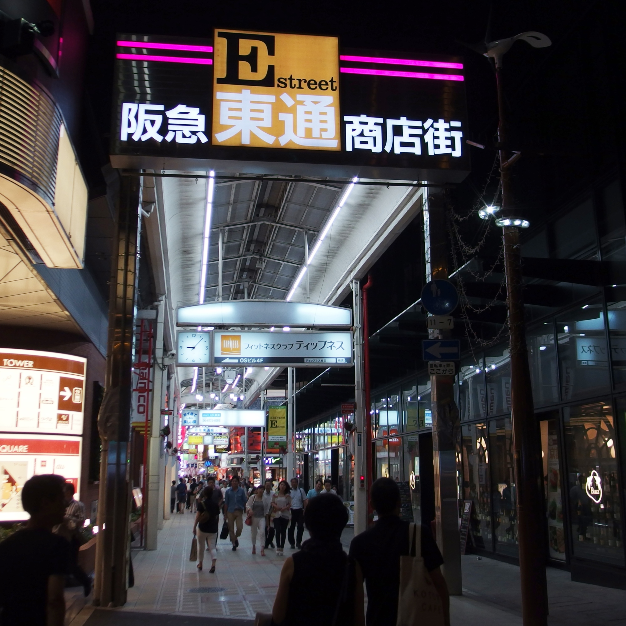 阪急東通り商店街, 大阪府大阪市